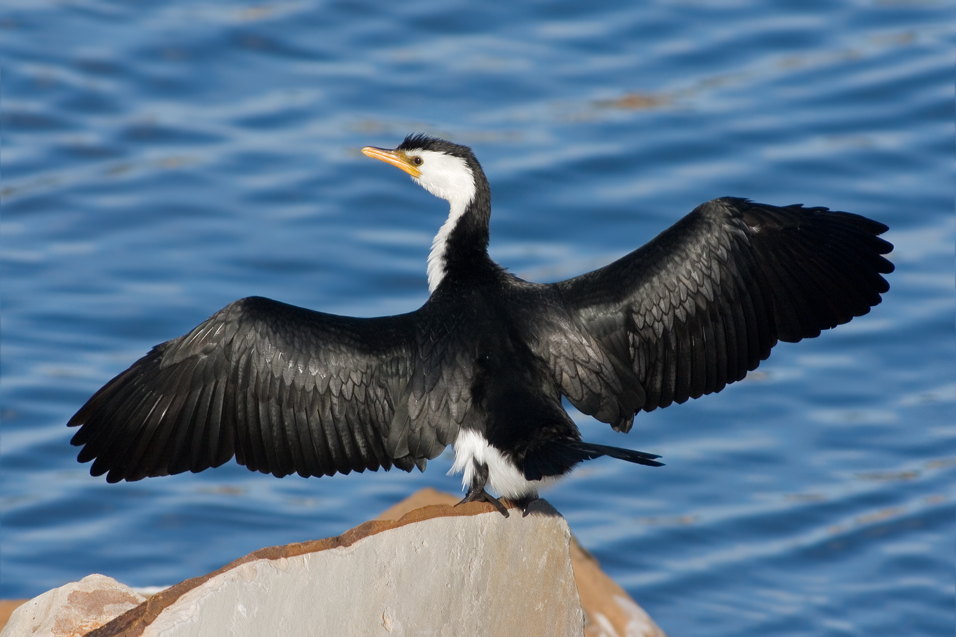 1.2 only